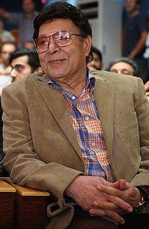 حسین عرفانی در مراسم تجلیل از چهار دوبلور پیشکسوت صدا و سیما